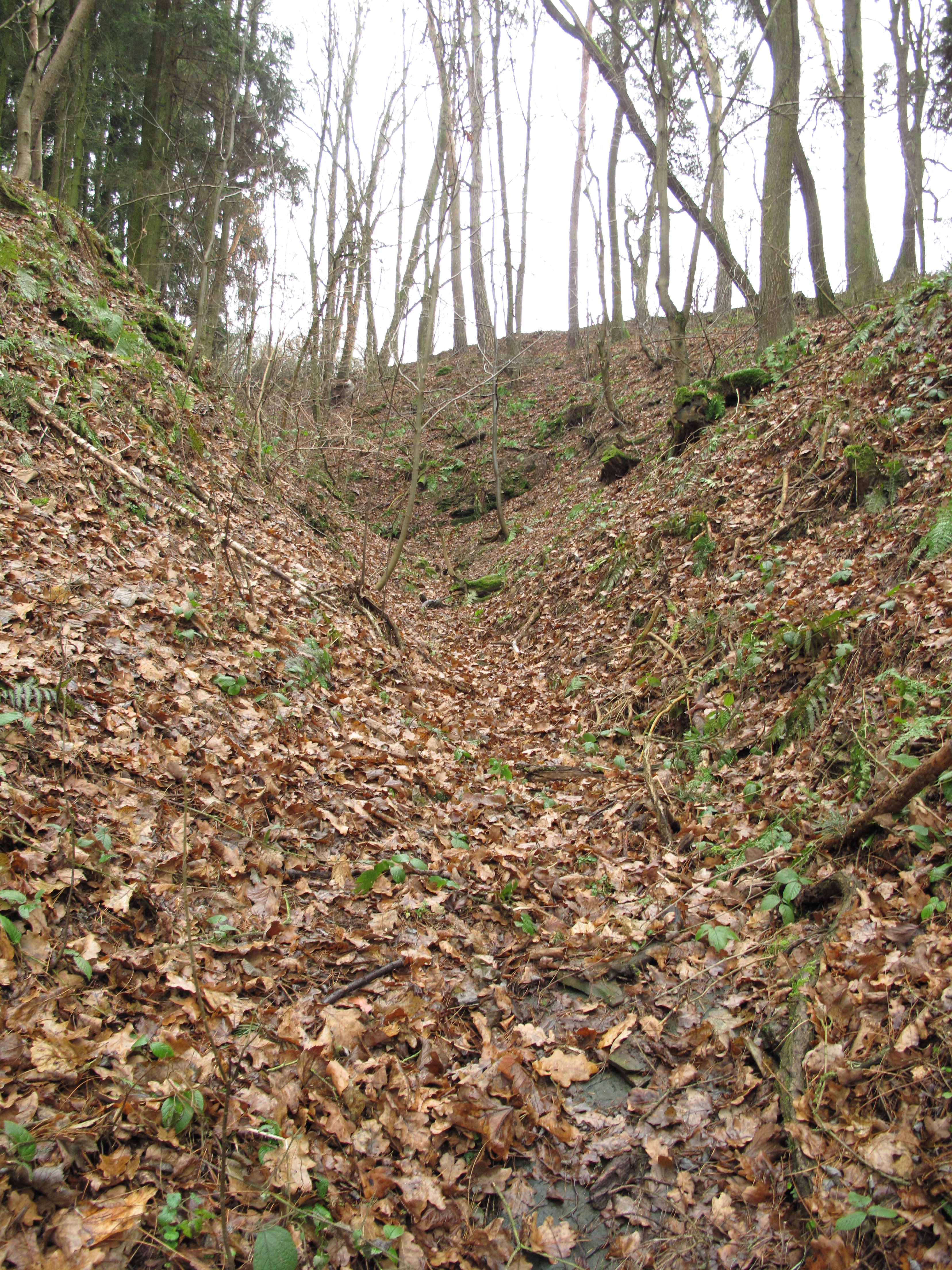 Koryto v přírodní památce Sedlecká rokle. Okres Plzeň-město, Česká republika.